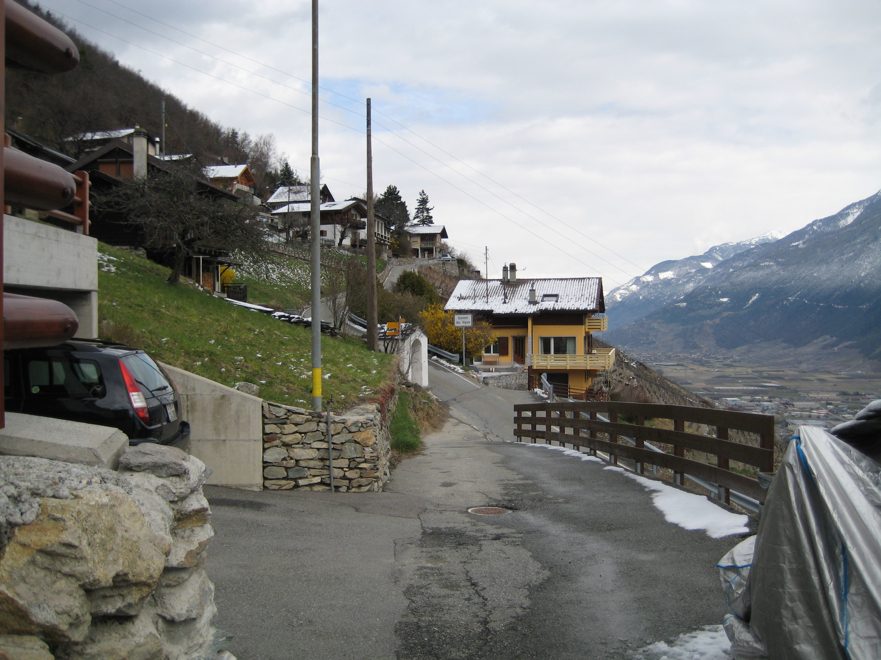 Sommet-Des-Vignes, localité de Martigny-Combe, Valais, Suisse